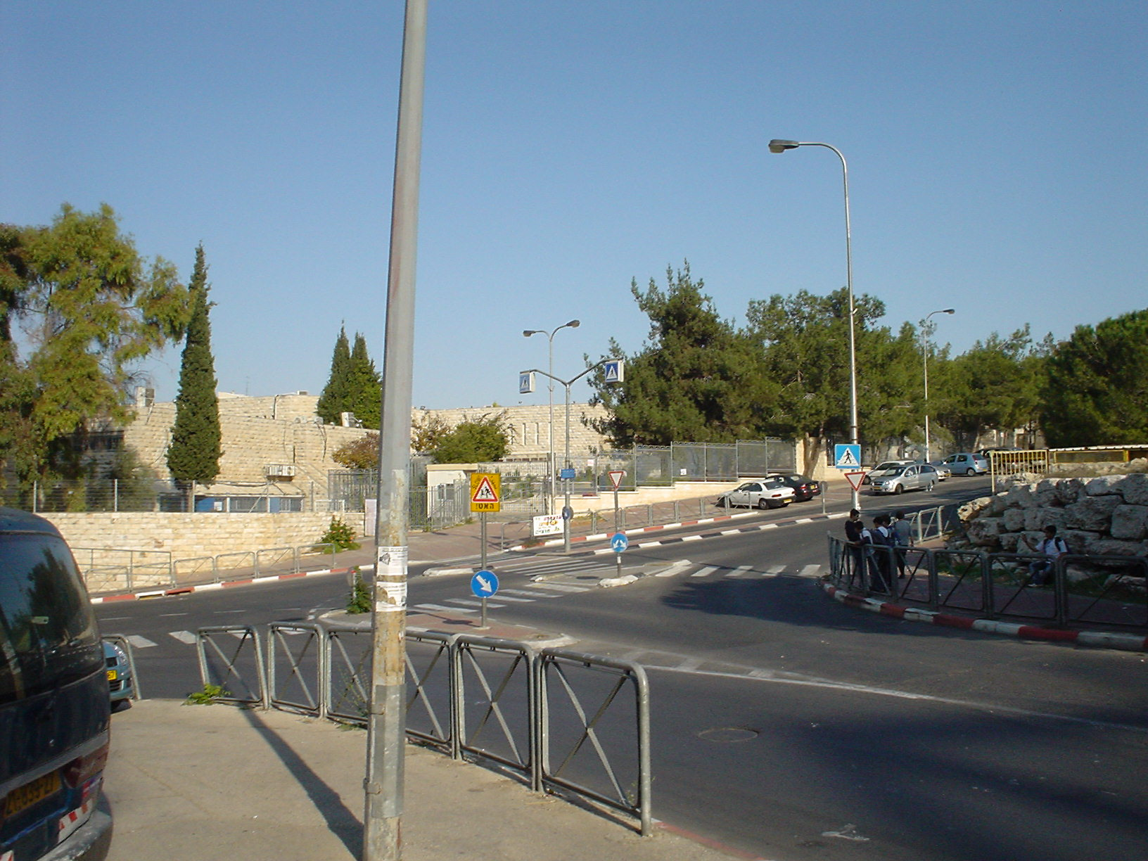 מבט ממעלות דפנה אל בית הספר רנה קסין